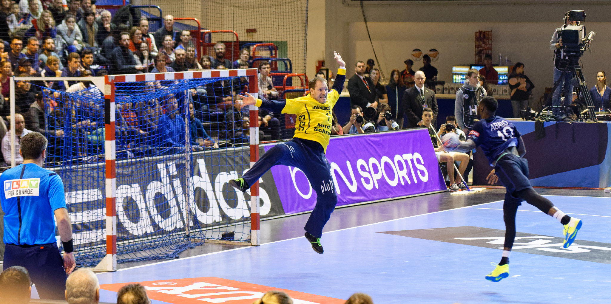 Rencontre de phase de groupe de la Ligue des Champions 2015-16 entre le PSG et SG Flensburg. A la Halle Carpentier (Paris), le 7 mars 2016.